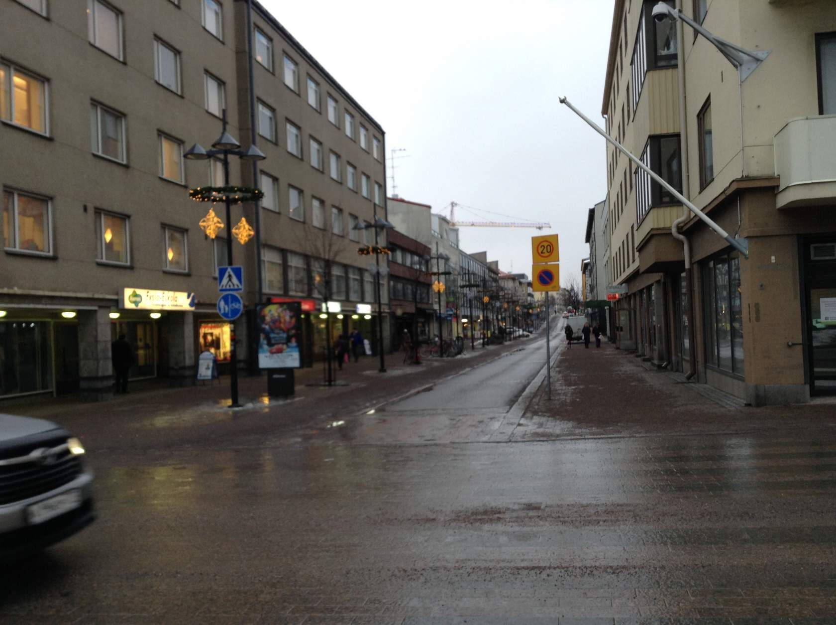 Lappeenranta street